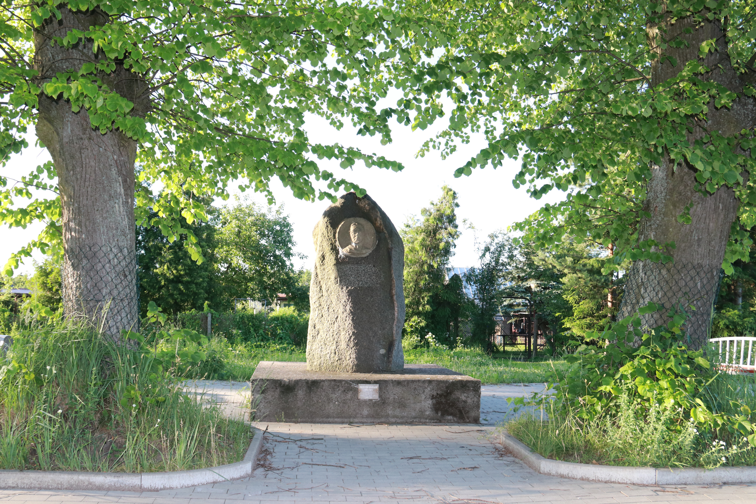 Denkmal Dewiescheit Lötzen Gesamtansicht 2019